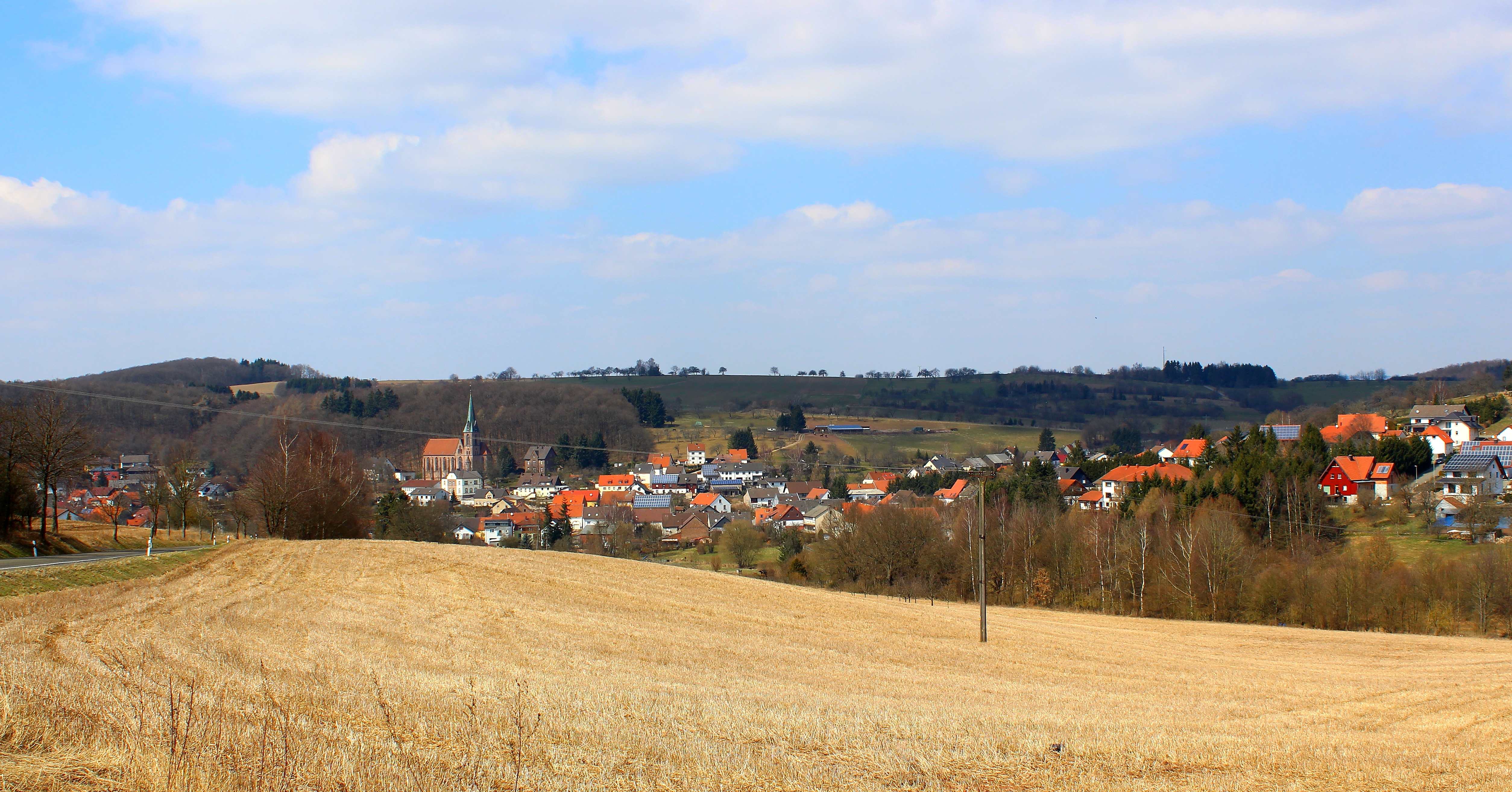 Blick auf Breitenbach (Pfalz), einer Ortsgemeinde im Landkreis Kusel, Rheinland-Pfalz.